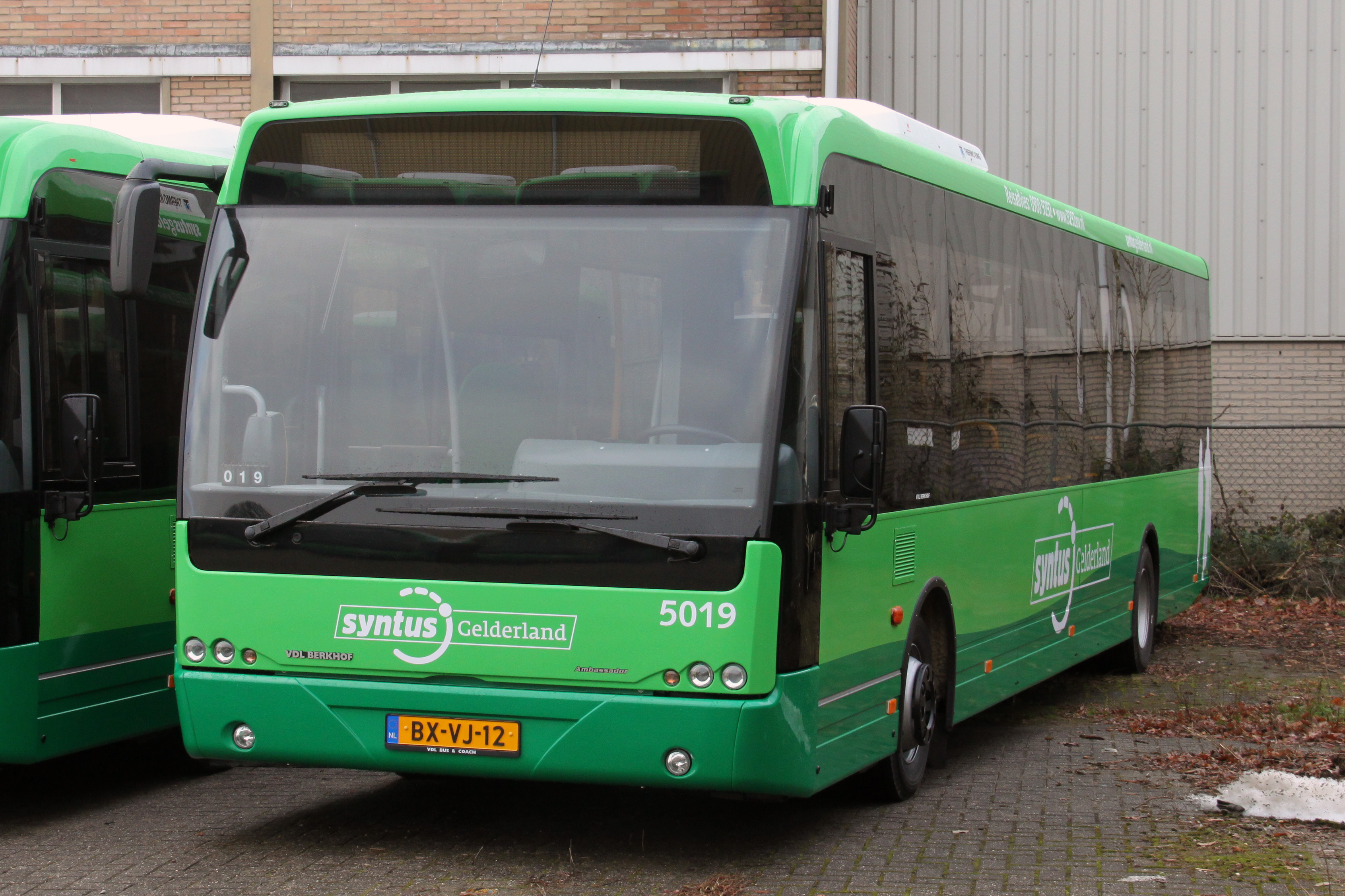 VDL Berkhof Ambassador van Syntus voor de Stadsdienst Apeldoorn (concessie Veluwe).